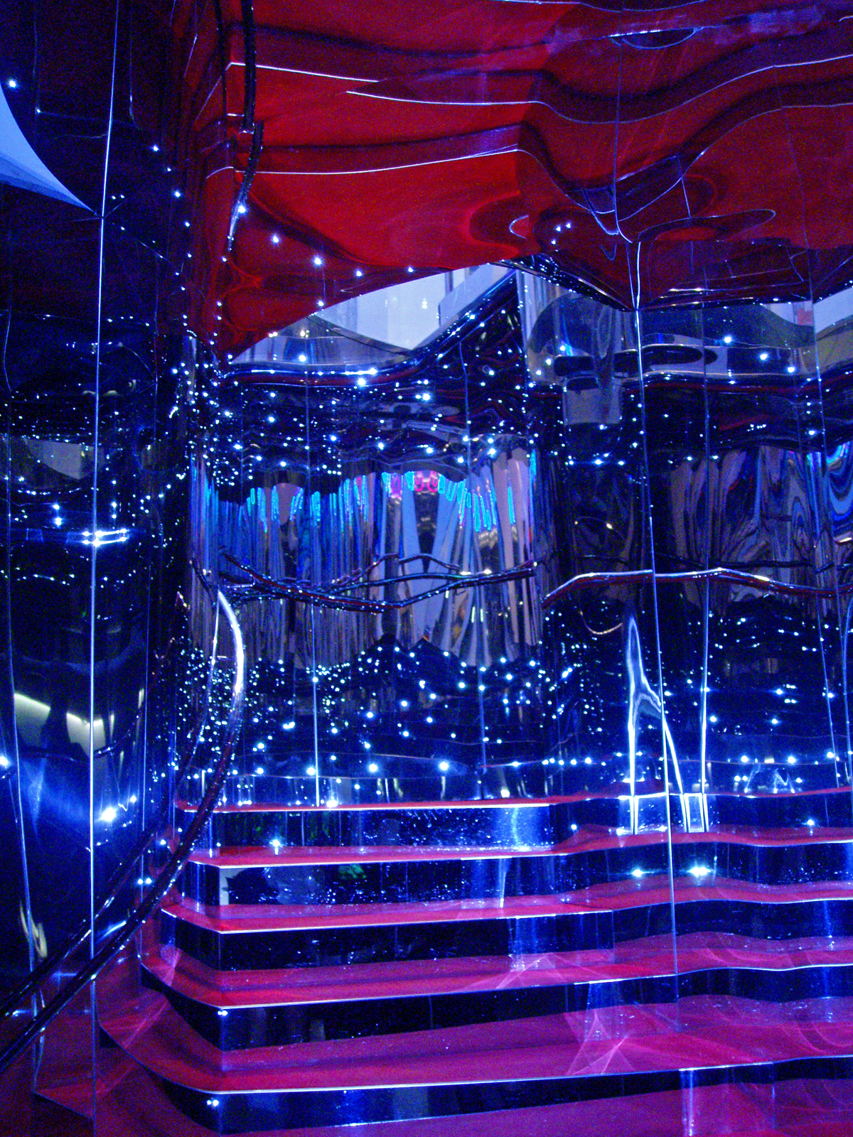 La scala d'ingresso del Just Cavalli Café di via della Spiga, nel quadrilatero della moda milanese.